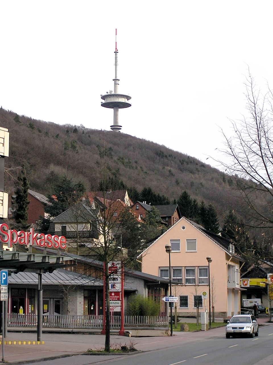 Porta Westfalica: Fernsehturm Jacobsberg Image:Jakobsberg Telecommunication Tower.jpg